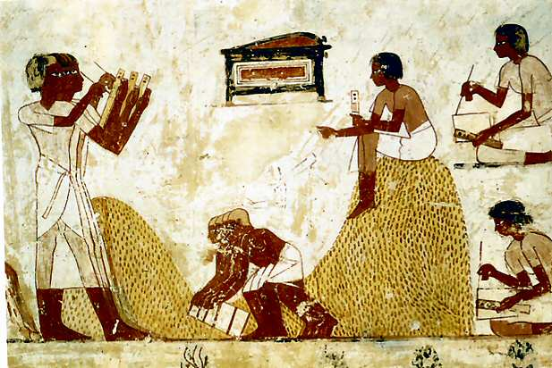 Des scribes enregistrent l'état de la récolte. Scène murale de la Tombe de Menna